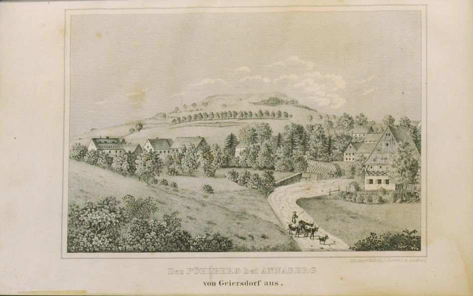 Johann Traugott Lindner: Wanderungen durch die interessantesten Gegenden des Sächsischen Obererzgebirges. Ein Beitrag zur specielleren Kenntniß desselben, seines Volkslebens, der Gewerbsarten, Sitten- und Gebräuche. Mit 12 Lithographien, Verlag Rudolph und Dieterici, Annaberg 1848 Digitalisat von Band 3 in der Staats- und Universitätsbibliothek Dresden Pöhlberg